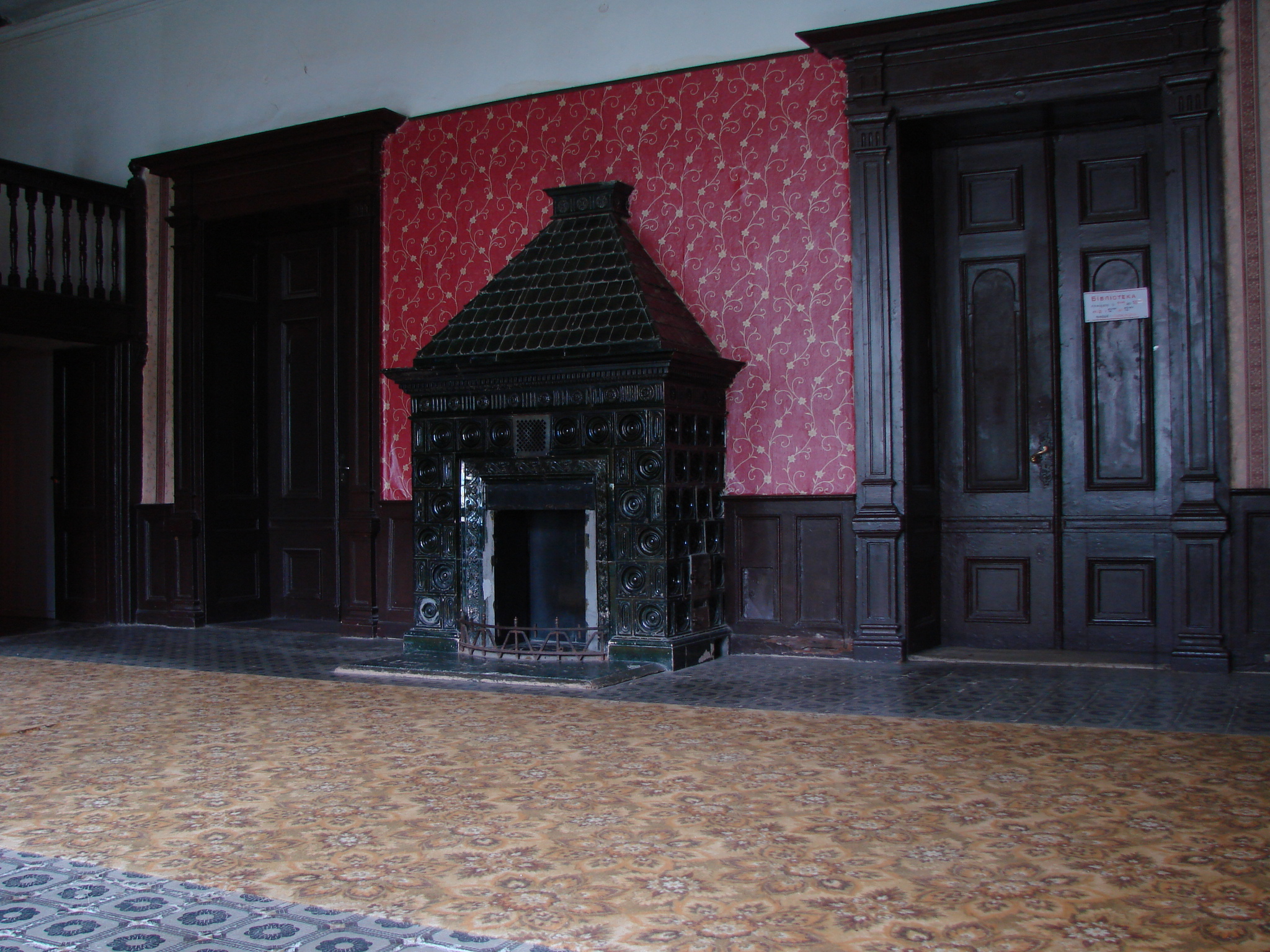 Камінна зала